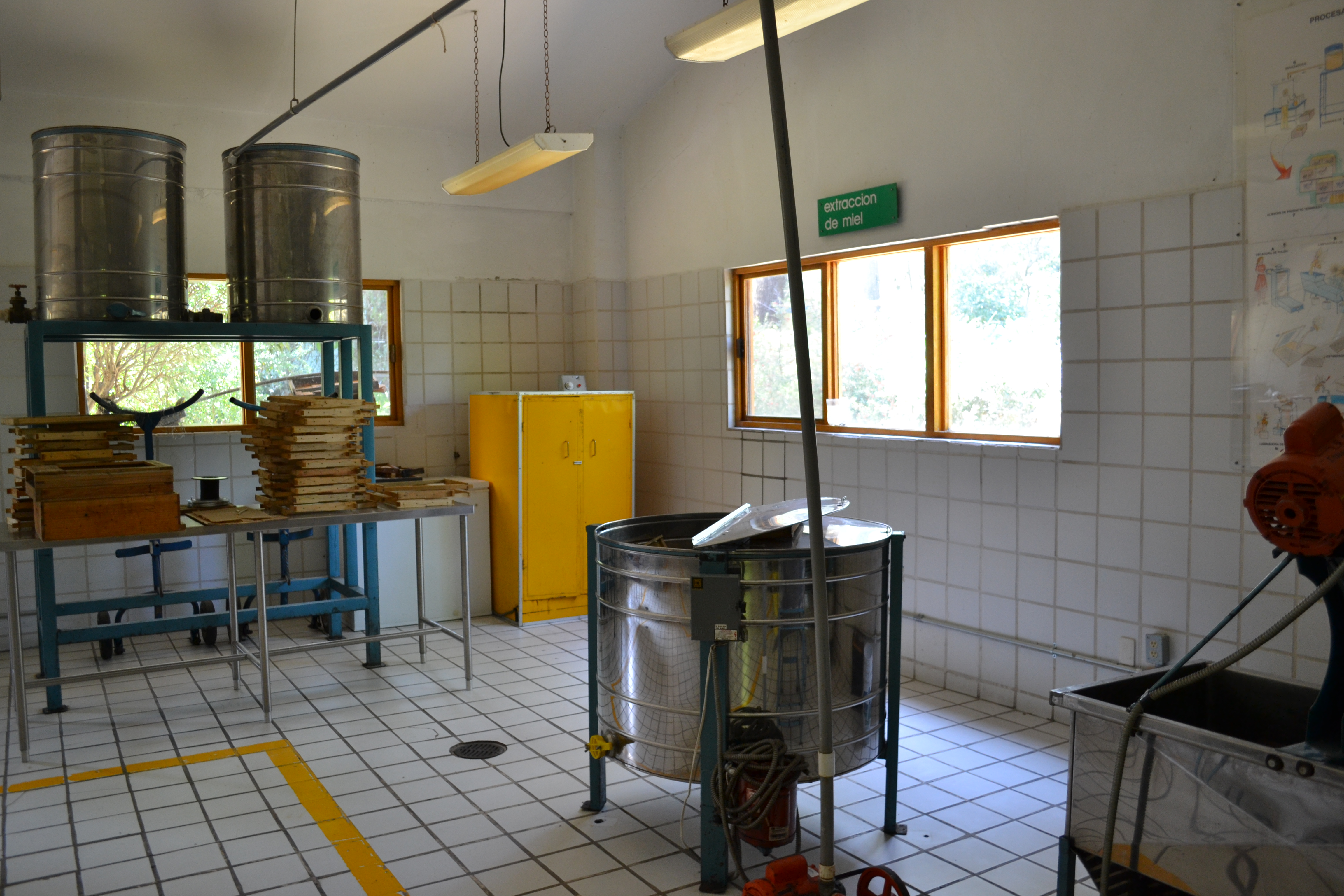 Sala de extracción de miel. Centro de Educación Ambiental Acuexcomatl: San Luis Tlaxiatemalco, Delegación Xochimilco en la Ciudad de México (Mexico City).